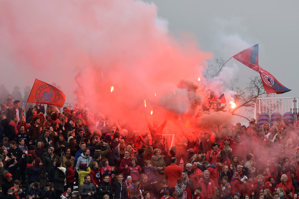 Anhänger des KHC Dragons vor EHL-Achtelfinale 2017 gegen Racing Brüssel